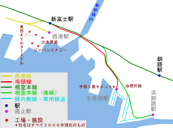 釧路開発埠頭・国鉄浜釧路支線の路線図。投稿者が作成。